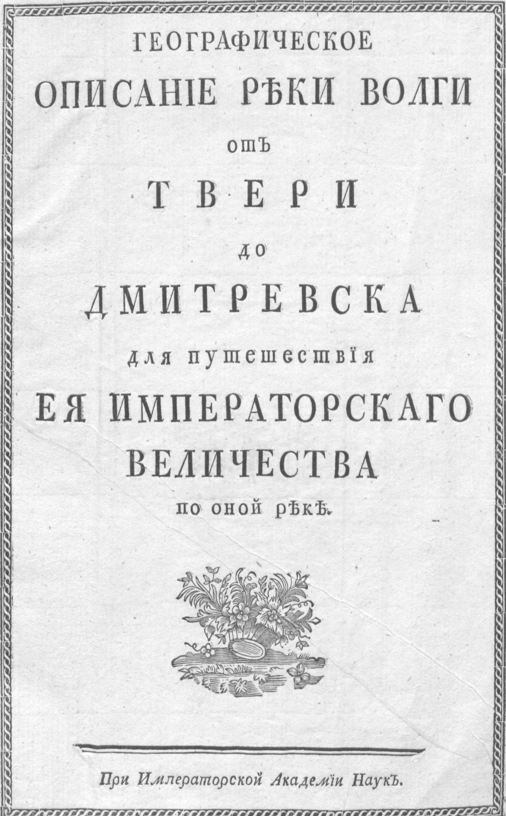 Титульный лист из книги: Стафенгаген И. И. Географическое описание реки Волги от Твери до Дмитриевска для путешествия Ея Императорскаго Величества по оной реке. — [СПб.]: При Имп. Акад. наук, [1767]. — [9] л.: 8 л. карт.